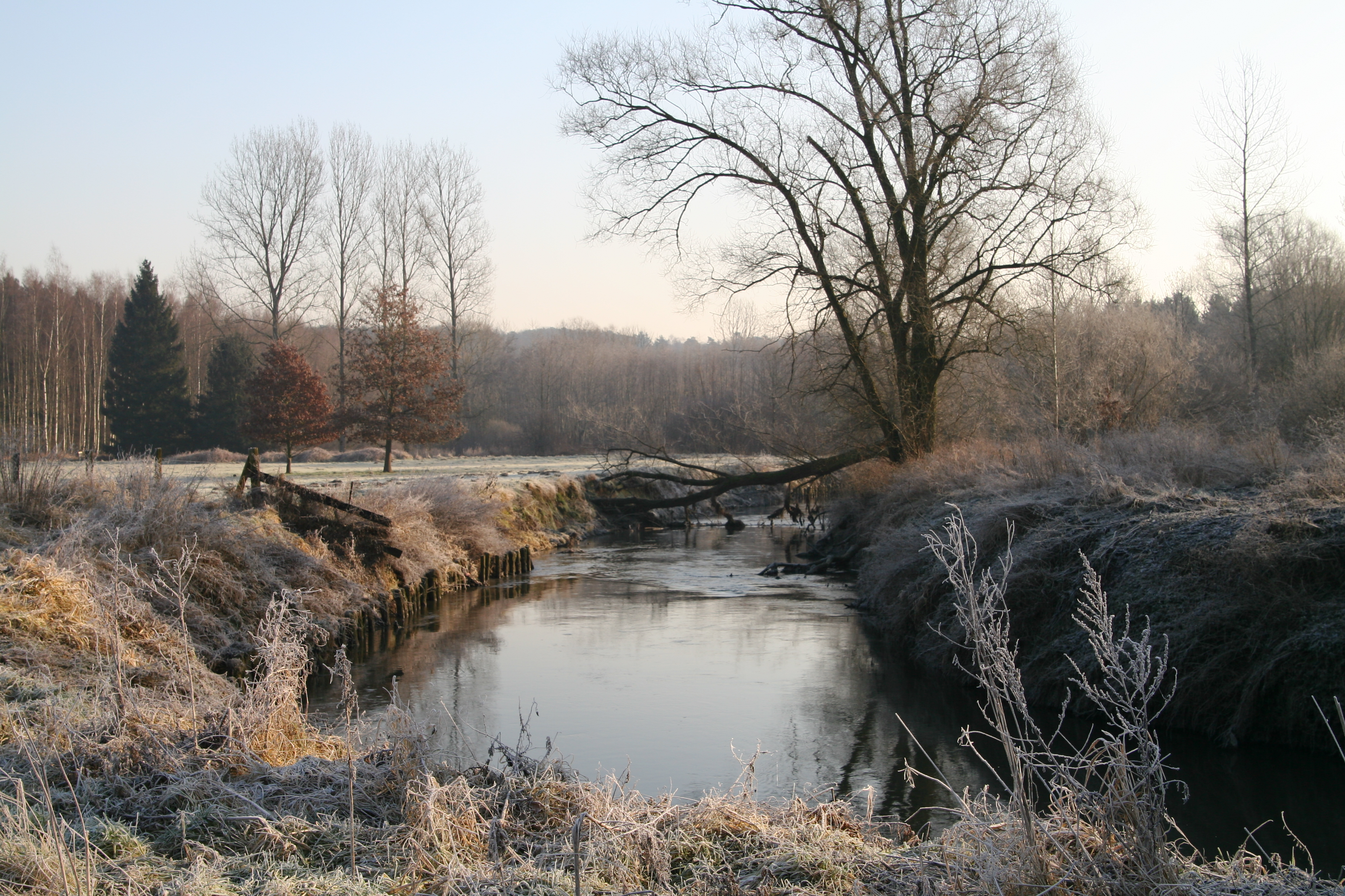 De Dijle, eind januari, ten zuiden van Leuven in het natuurgebied "De Doode Bemde" te St. Joris Weert, deelgemeente van Oud-Heverlee